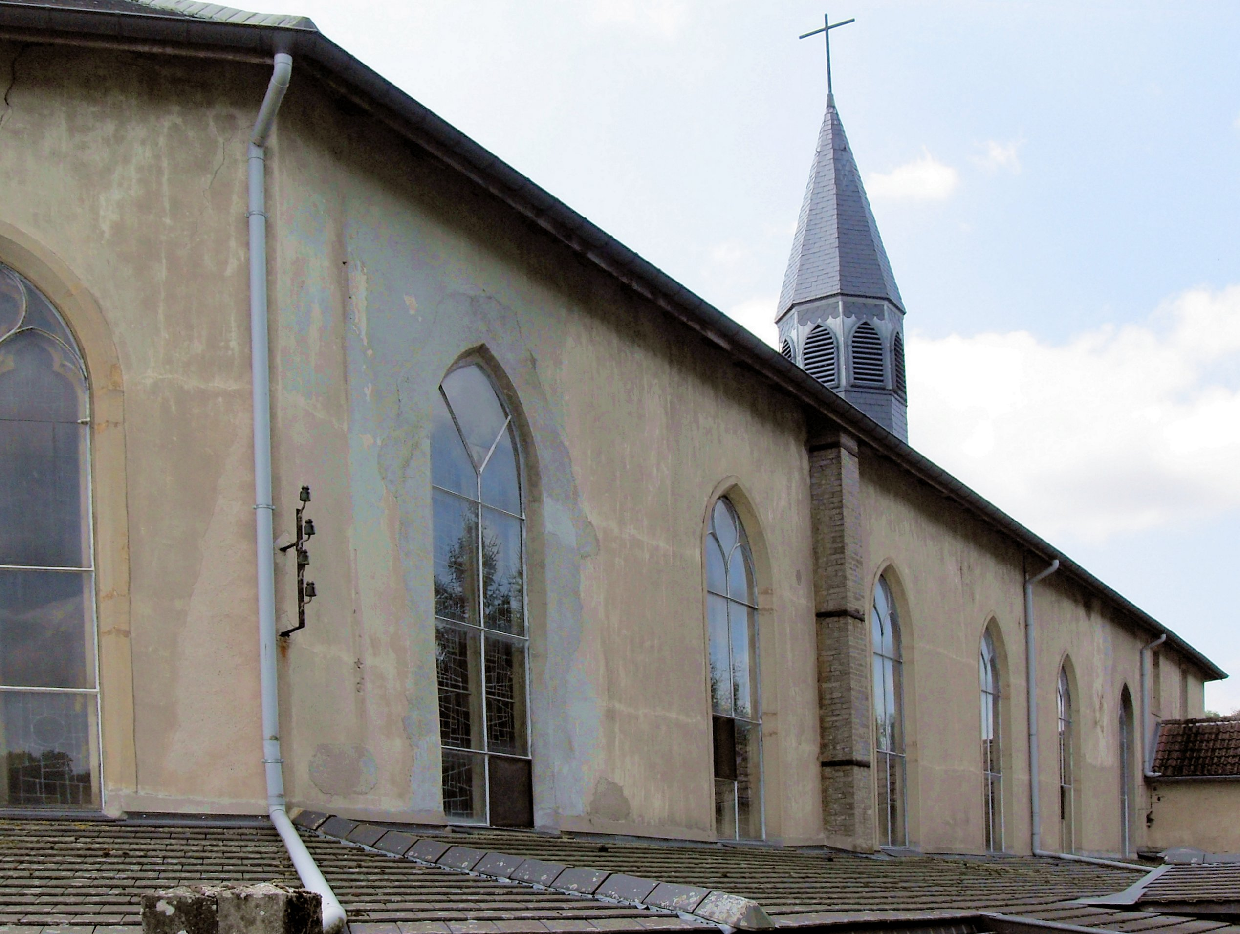 L'église d'abbaye Notre-Dame de Saint-Joseph àUbexy